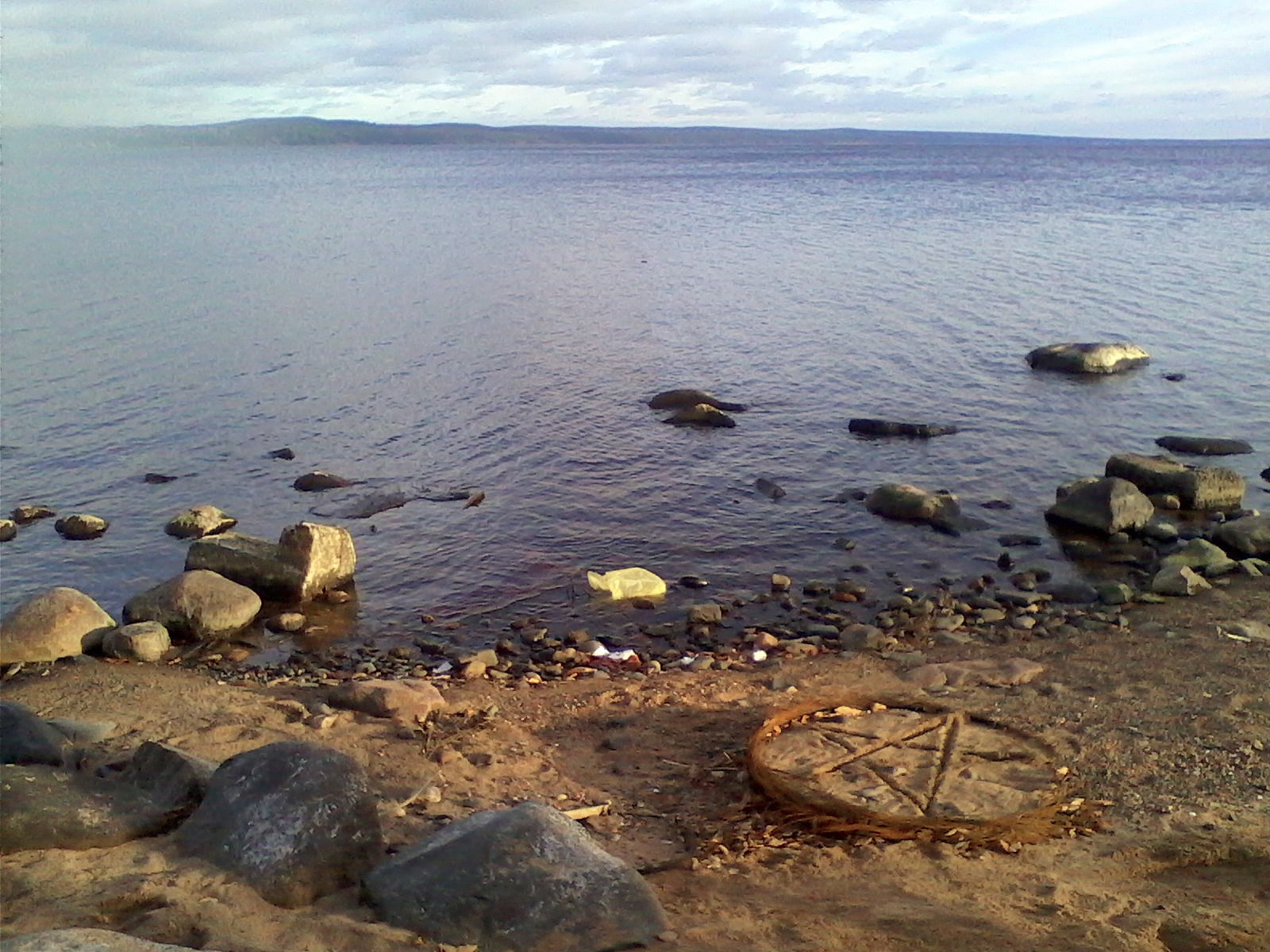 Берег Онежского озера